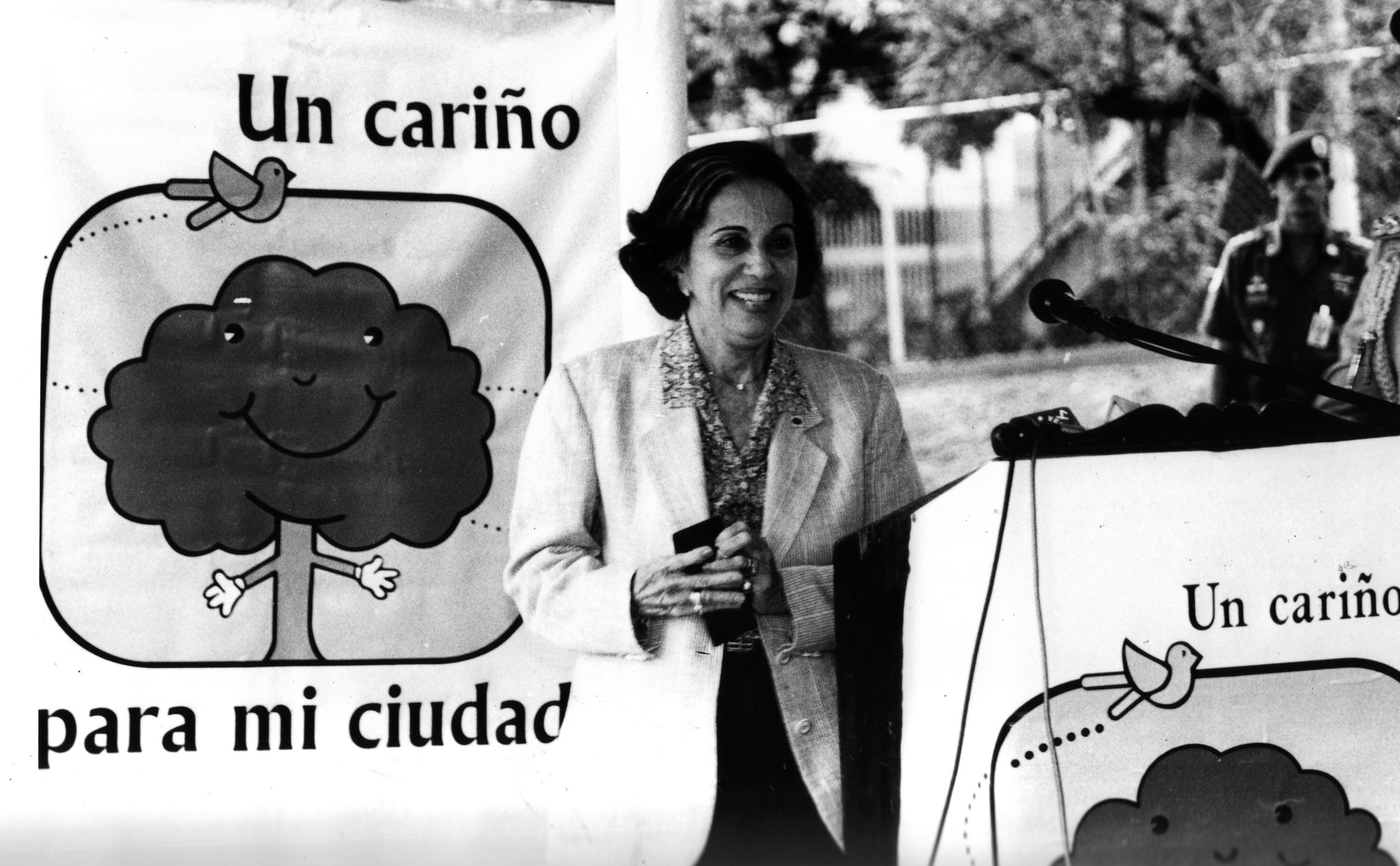 Alicia Pietri de Caldera presentando el programa Un cariño para mi ciudad.